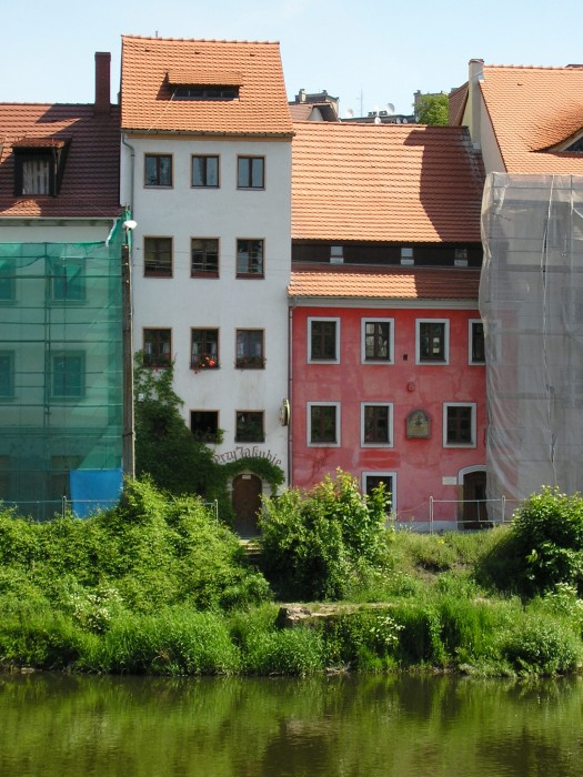 Das Jakob-Böhme-Haus in Zgorzelec (Polen)